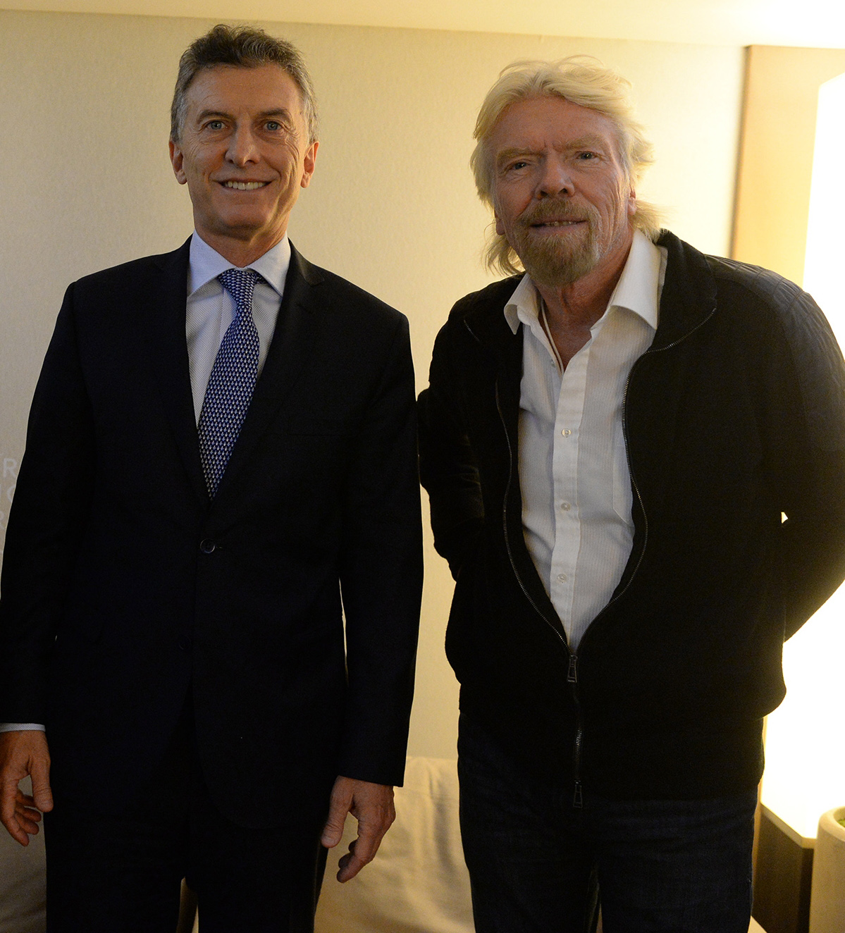 El presidente de Argentina Mauricio Macri con el fundador del conglomerado Virgin Group, Richard Branson.